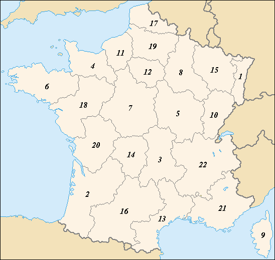 Любомир Таушанов, 2005 г.